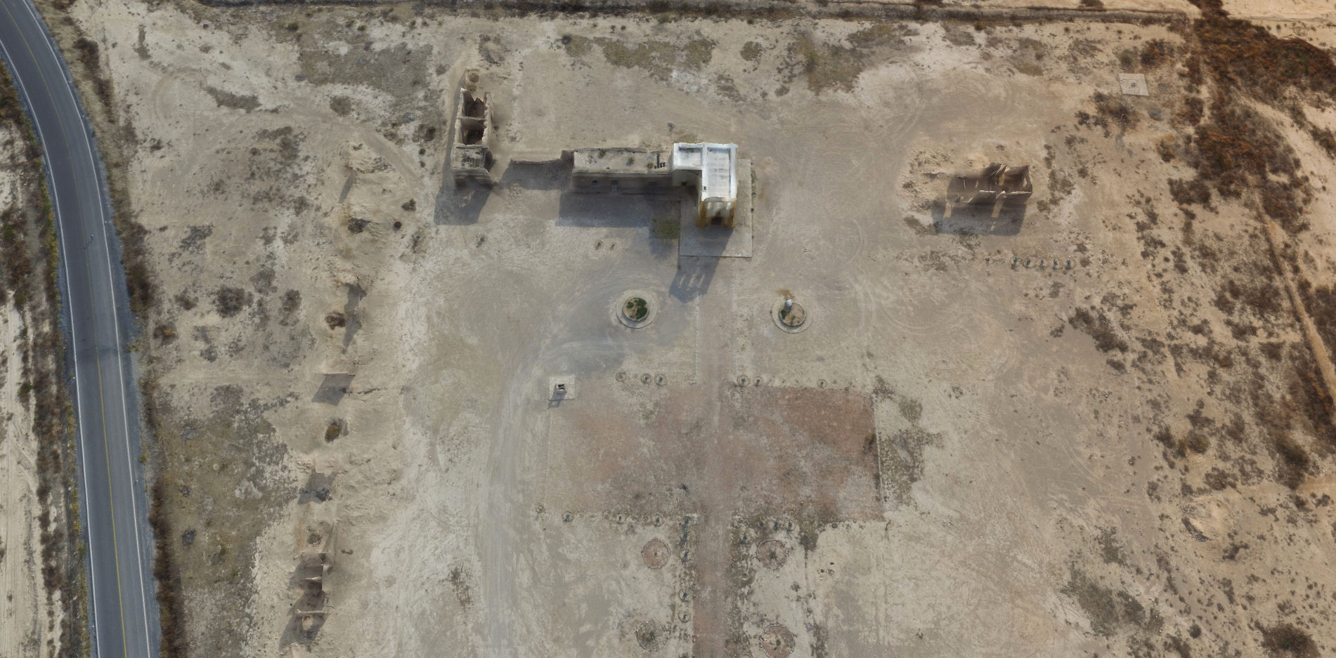 hacienda del muerto aerea 4